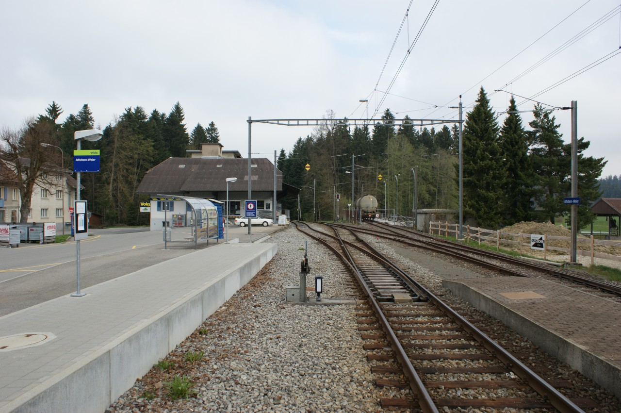 Bahnhof Affoltern-Weier im letzten Betriebsjahr der S4, ab Dezember 2009 fuhren hier nur noch Busse